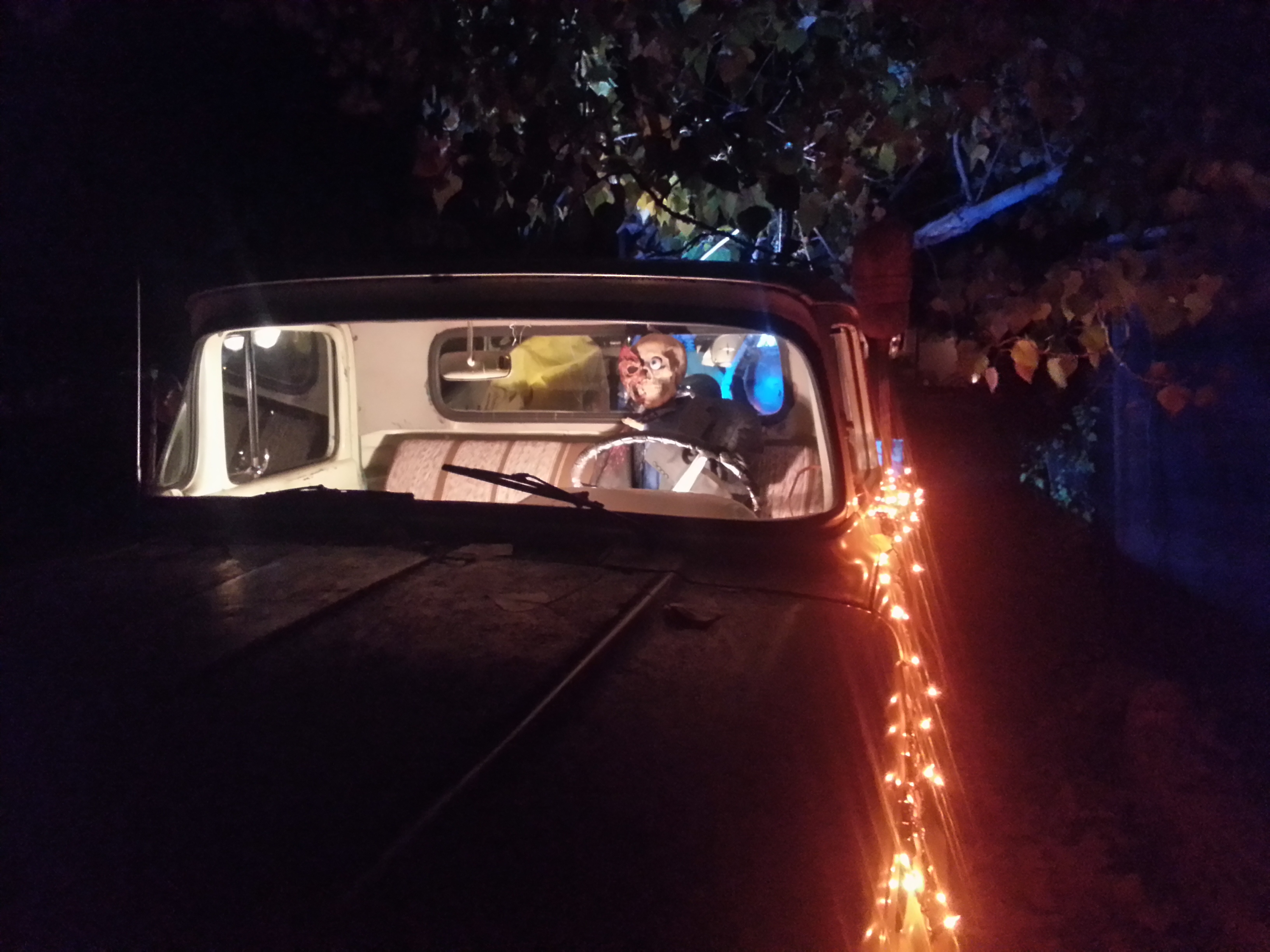 Halloween